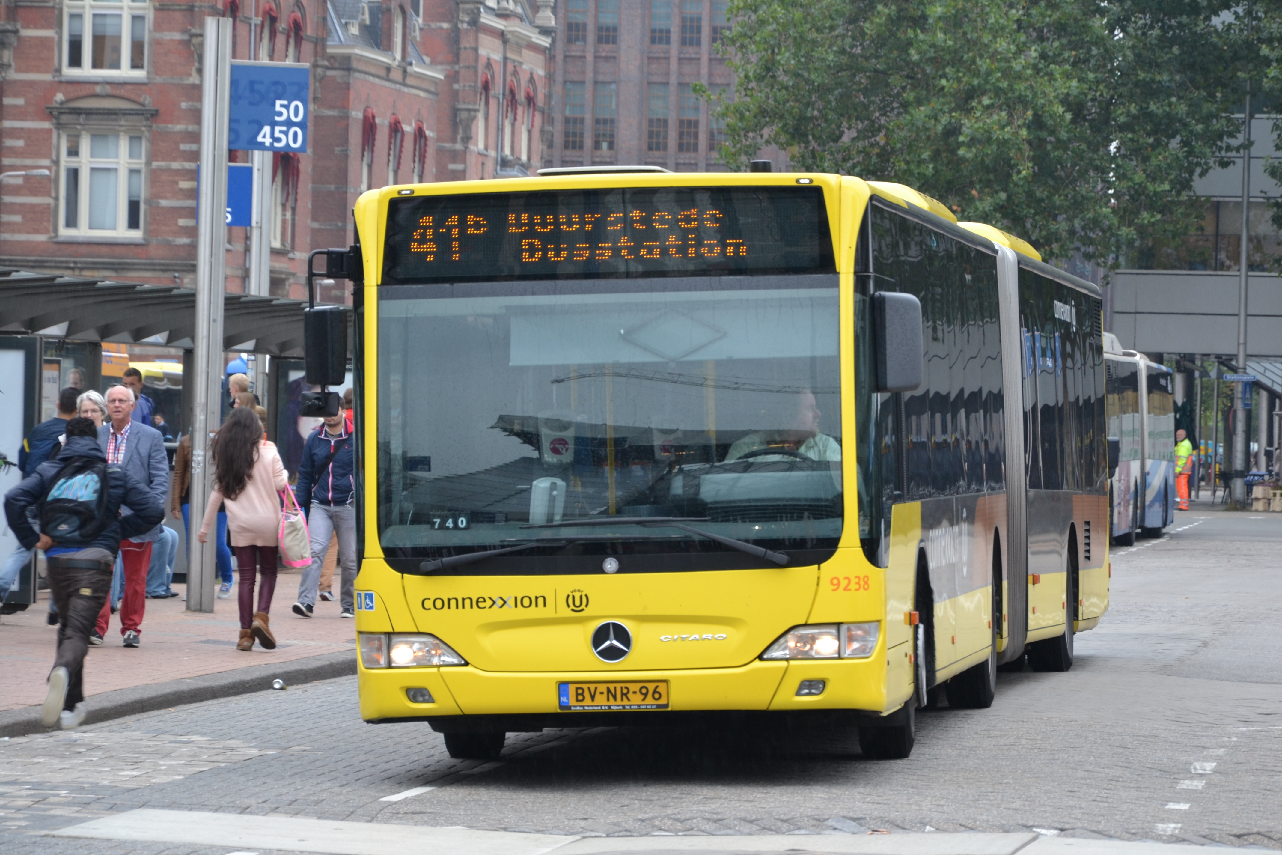 Connexxion 9238 als lijn 41 naar Wijk bij Duurstede op het regenachtiche en chatotisch drukke Busstation Oost.